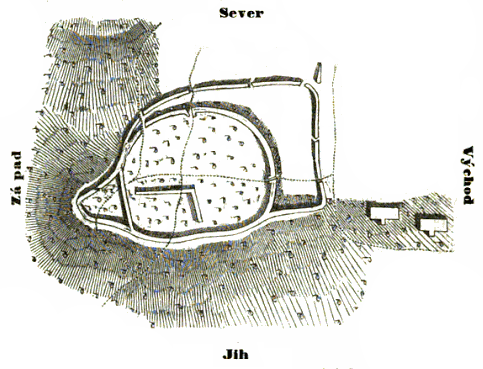 Češov – půdorys hradiště podle Jana Erazima Vocela publikovaný v knize Pravěk země České v roce 1868